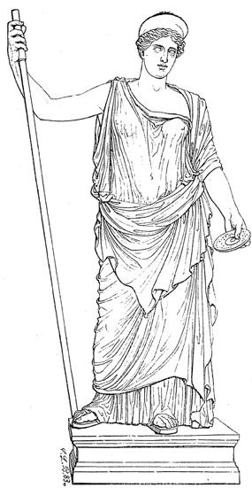 Barberinische Juno im Vatikan zu Rom (Hera)